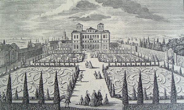 Villa Ghirlanda Silva, incisione di Karl Remshart raffigurante il parco.